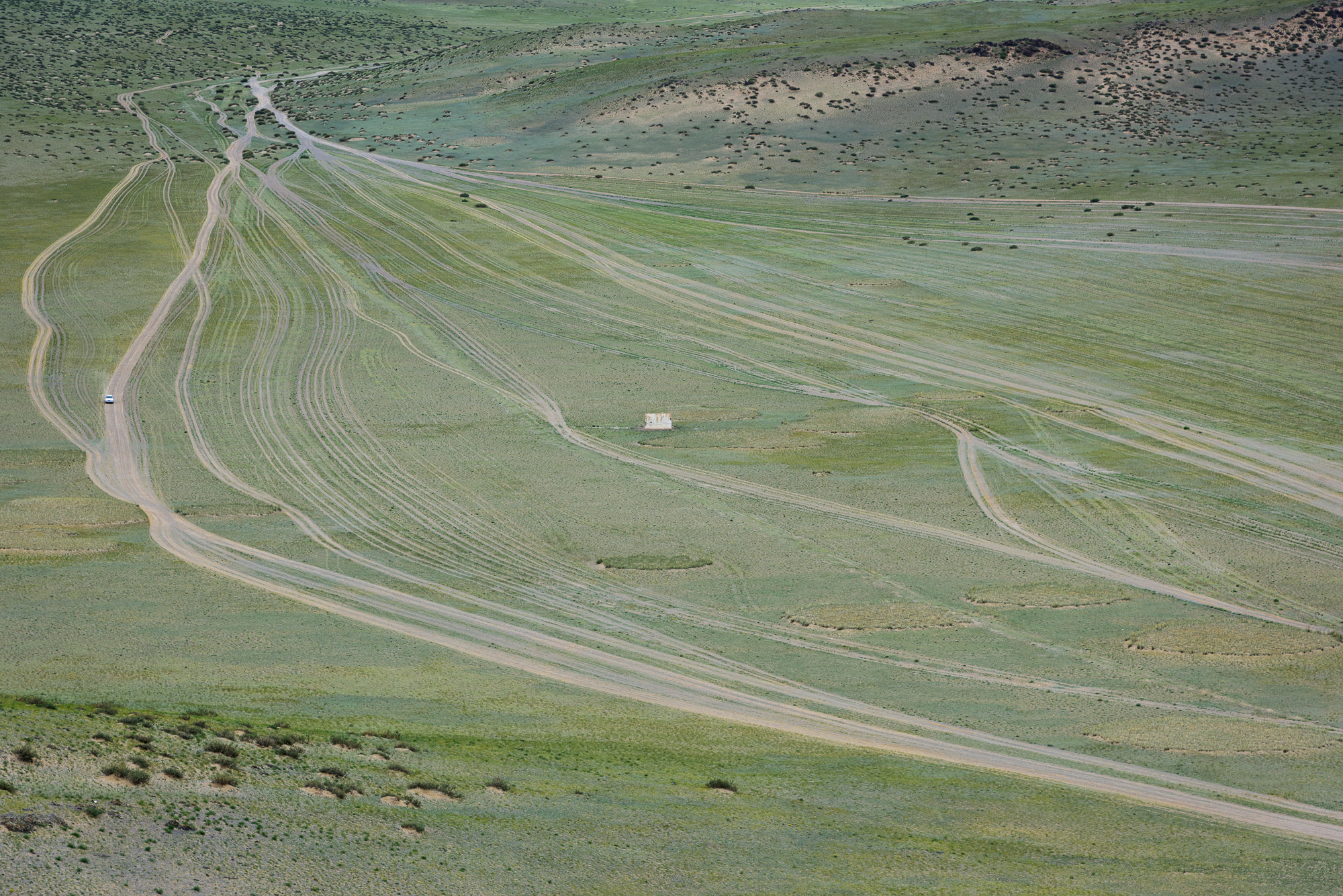 Unzählige Wege und Schotterpisten bilden das Straßennetz der Mongolei. Es ist oft nicht einfach hier den richtigen Weg zum Ziel zu finden.